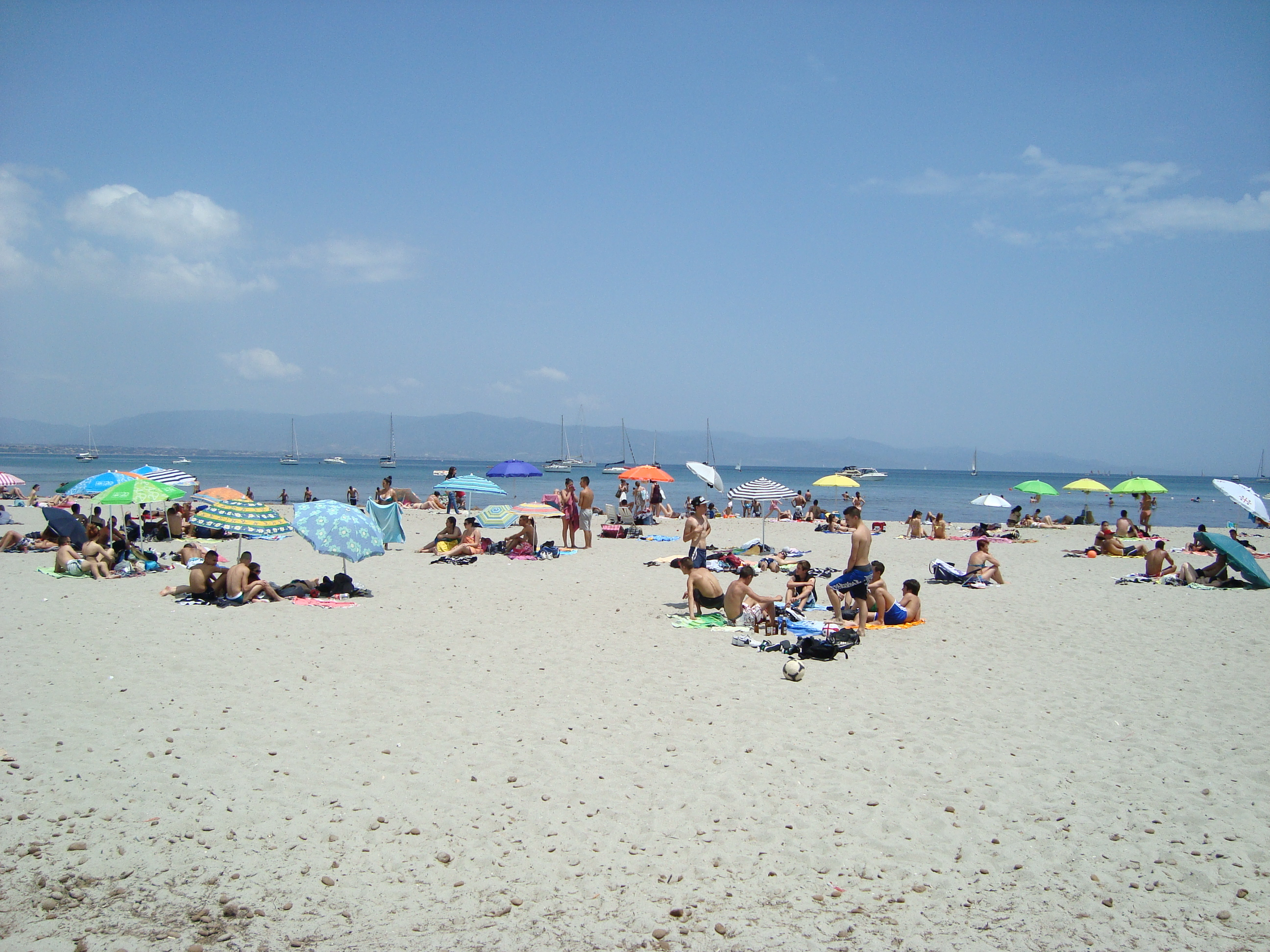 Cagliari